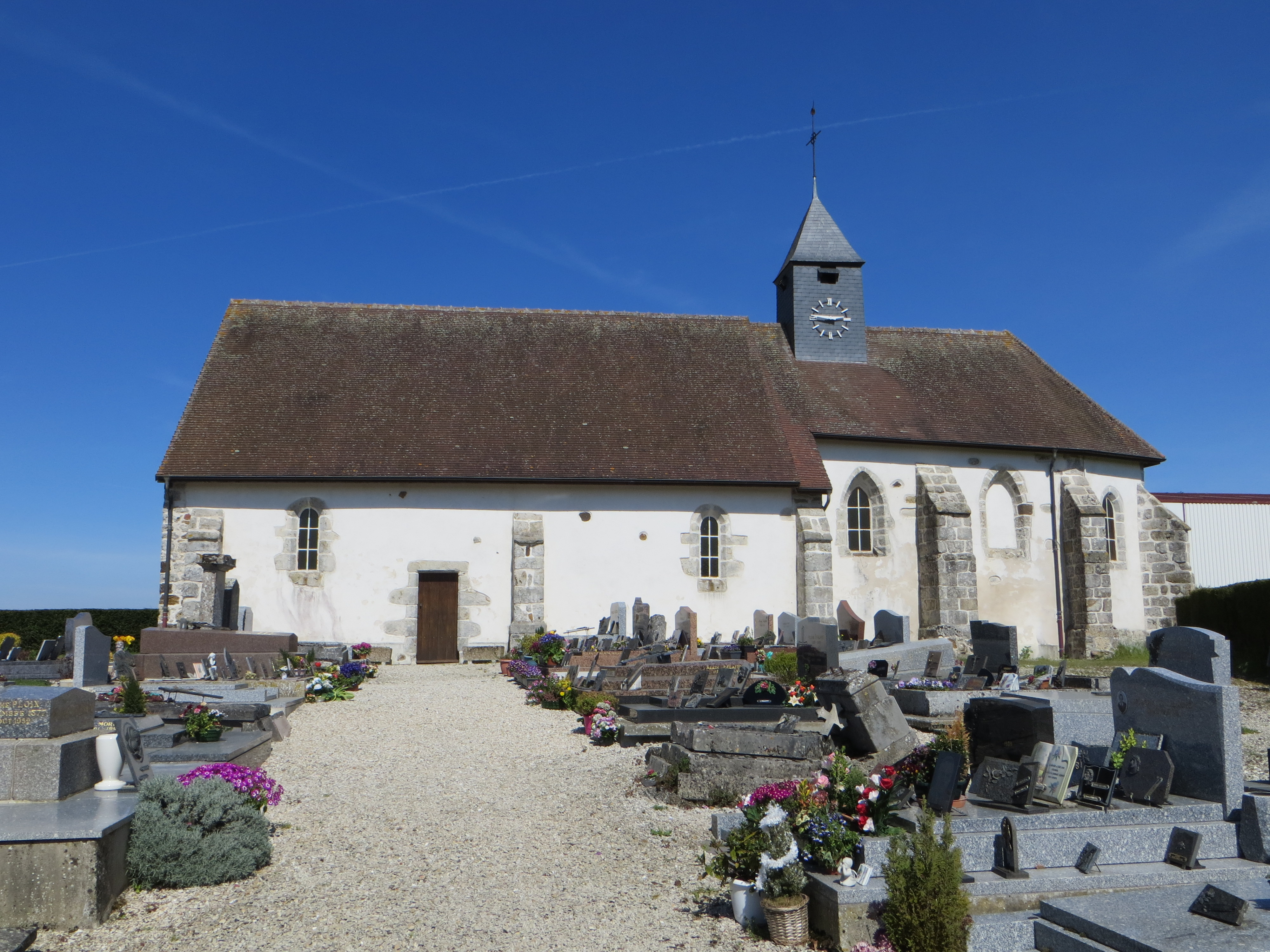 Vue générale de l'église